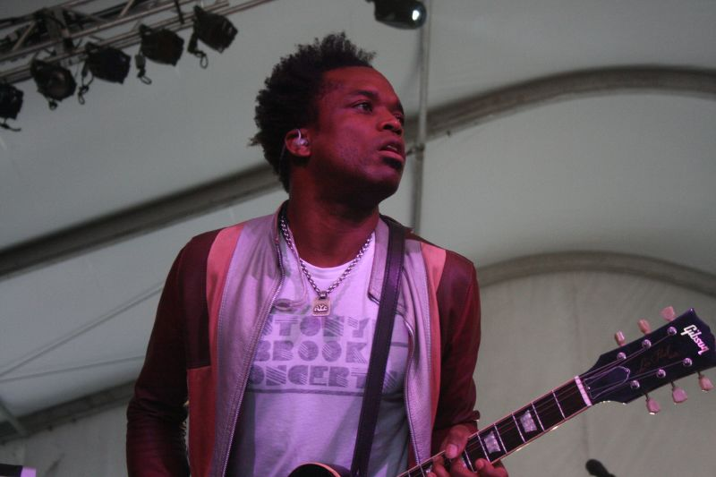 Picture 252